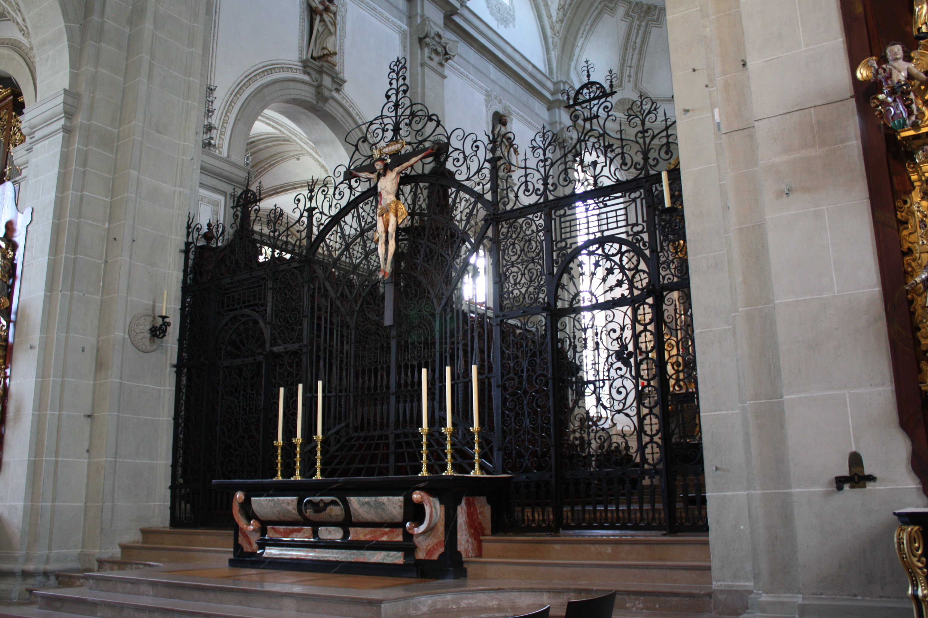 St. Leodegar im Hof, Luzern (Schmiedeisentor zum Altarraum)